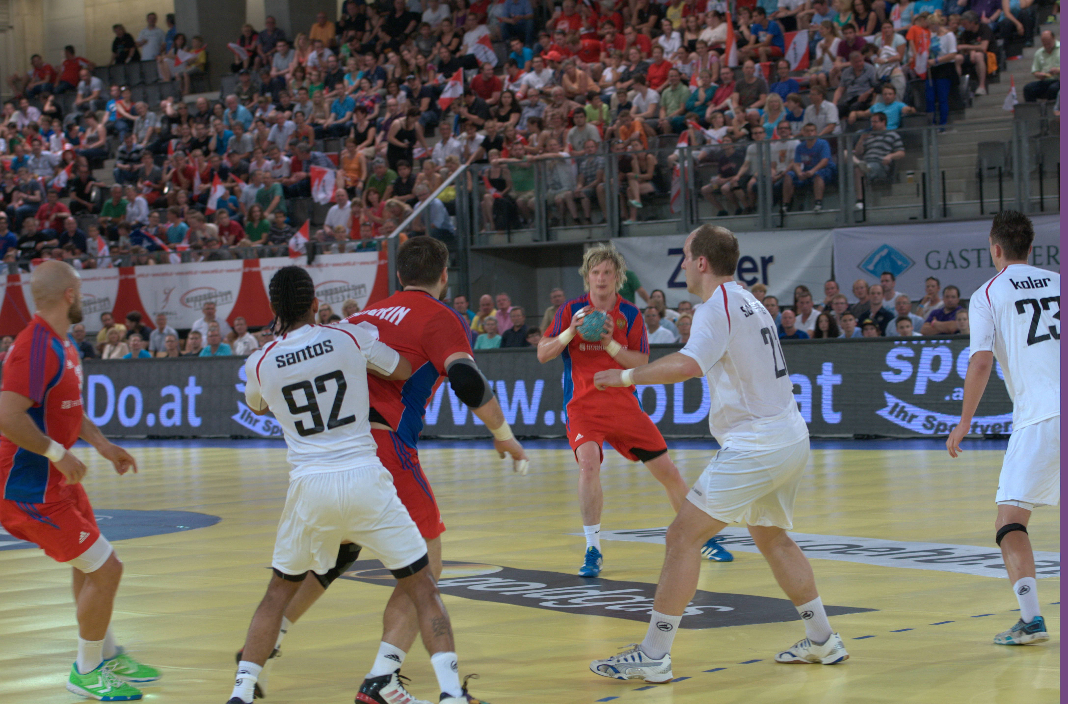 Handball EM Qualifikationspiel Österreich vs. Russland